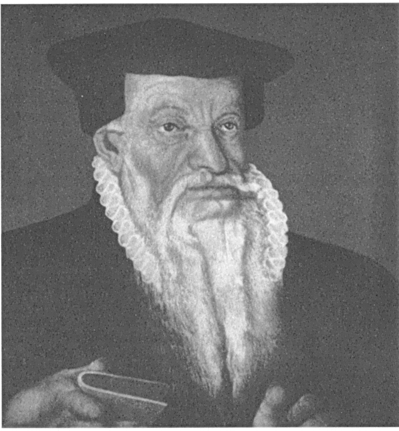 Eberhard Bidembach (1528 - 1597), Epitaph in der Klosterkirche Bebenhausen. Ausschnitt